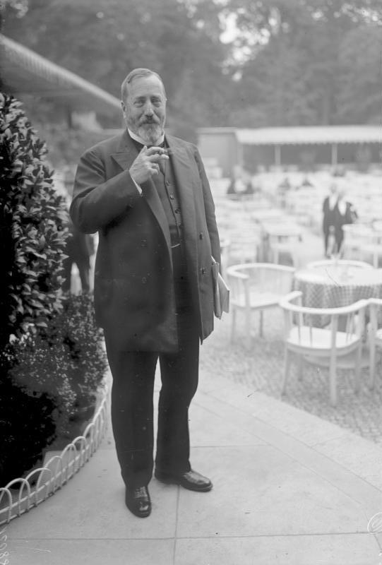 Bernhard Dernburg, der Leiter der Akzept- und Garantiebank. Der ehemalige Staatsminister des Reichskolonial-Amts Bernhard Dernburg ist zum Leiter der von den Grossbanken gegründeten Akzept- und Garantiebank ernannt worden.